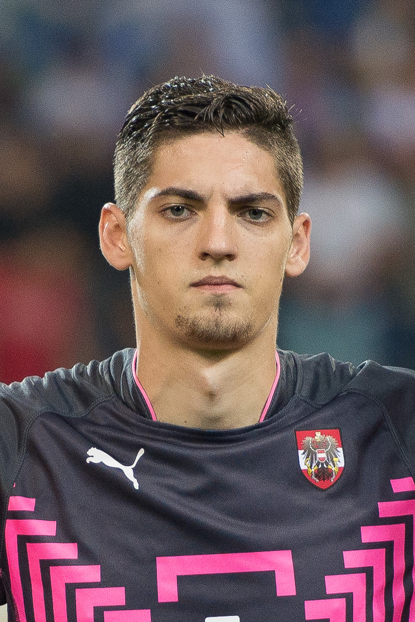 Fußball U21 EM-Qualifikation Österreich gegen Bosnien und Herzegowina St. Pölten, 5. September 2014 Cican Stankovic